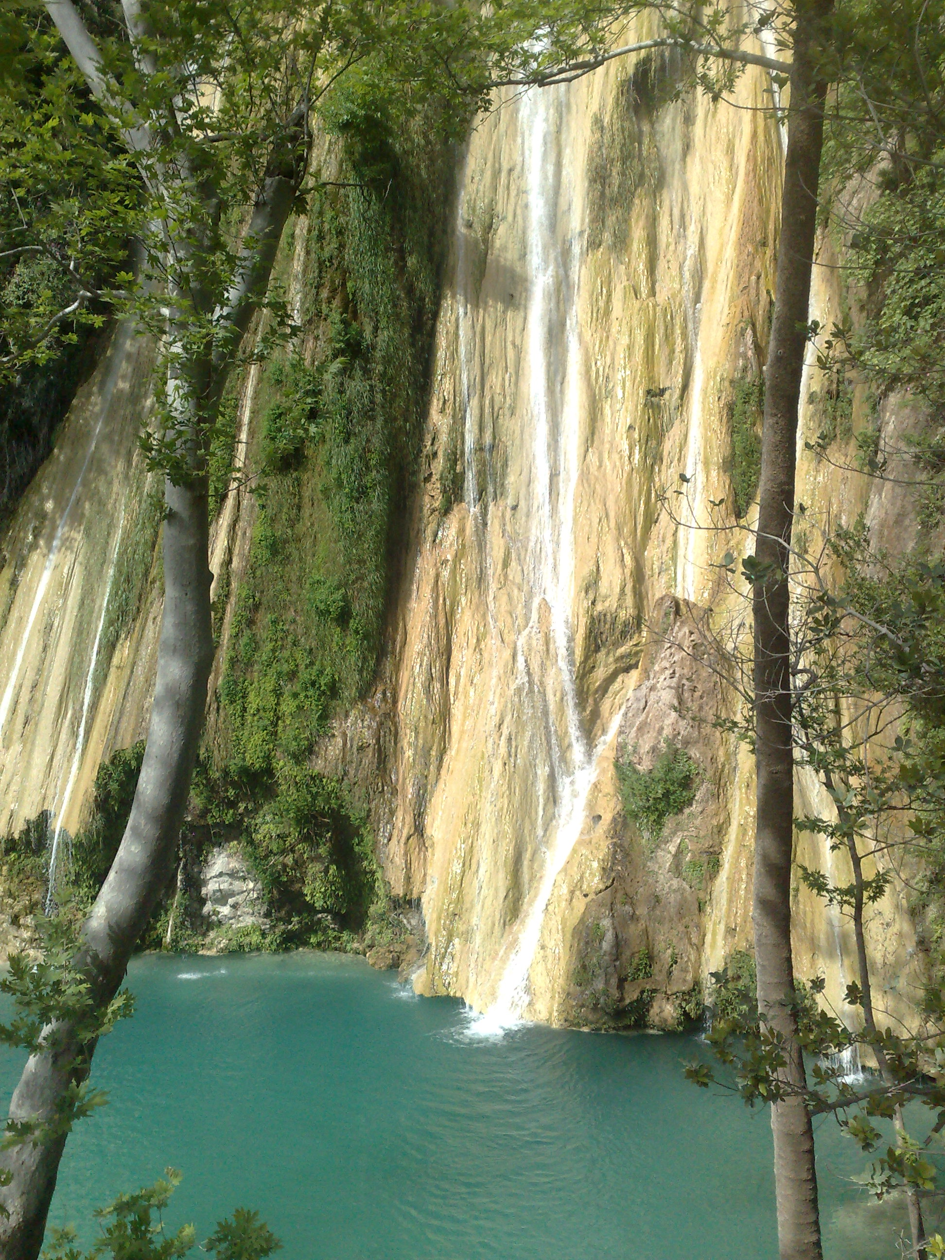 Uçan su